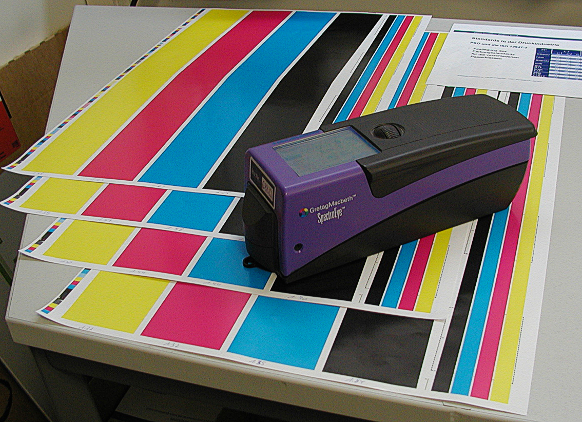 Das "SpectroEye" der Firma GretagMacbeth